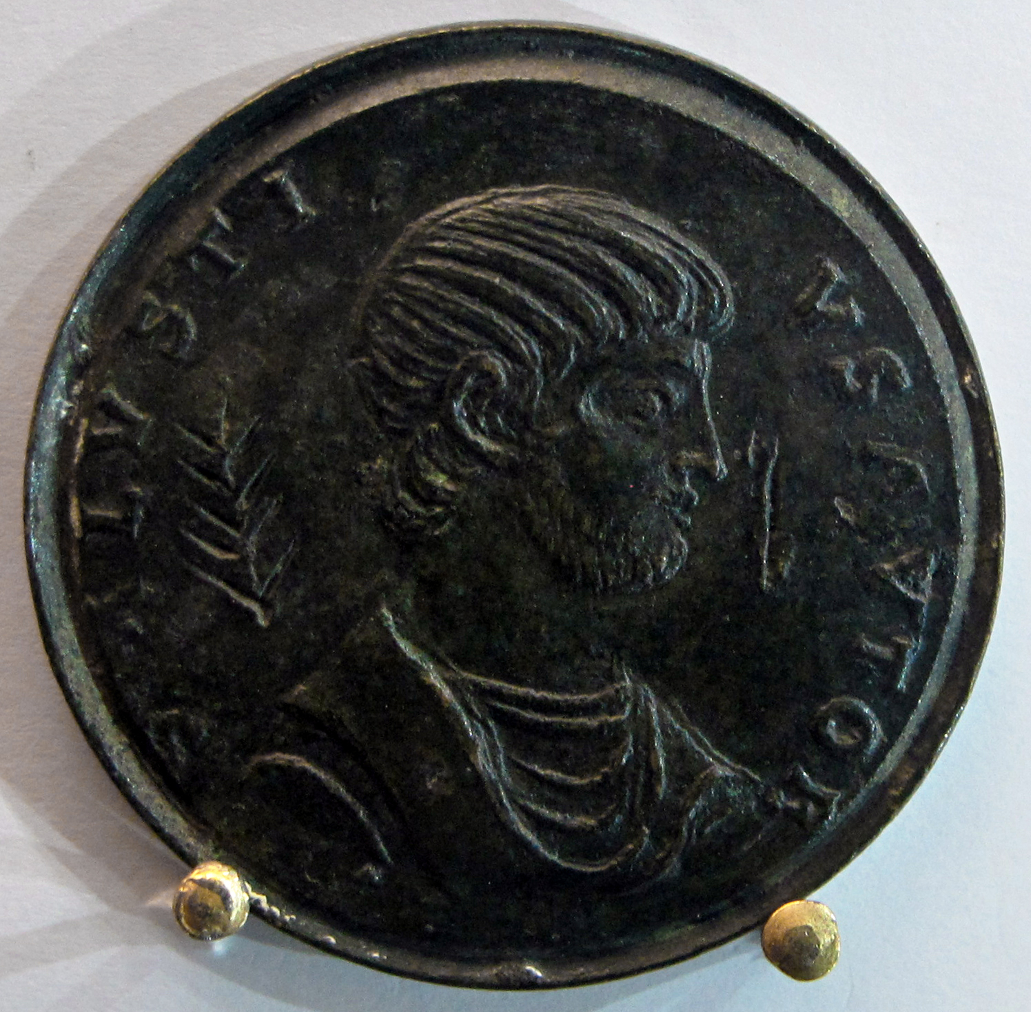 Medaglione contorniato di sallustio con busto